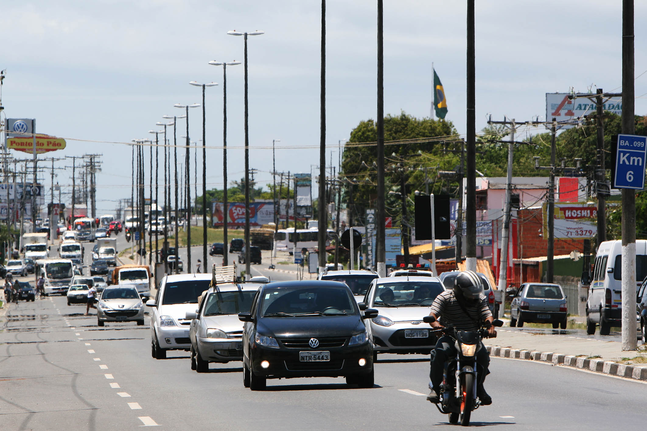 Movimentação de saída da cidade para o Ano Novo Na foto: Estrada do Coco (Lauro de Freitas), região do primeiro Posto do Batalhão da Polícia Rodoviária Estadual Foto: Carol Garcia / SECOM